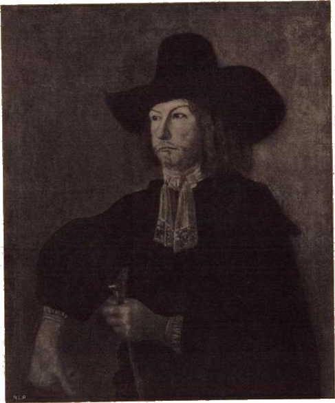 Rådmann i Christiania Peder Nielsen Leuch (død 1693)